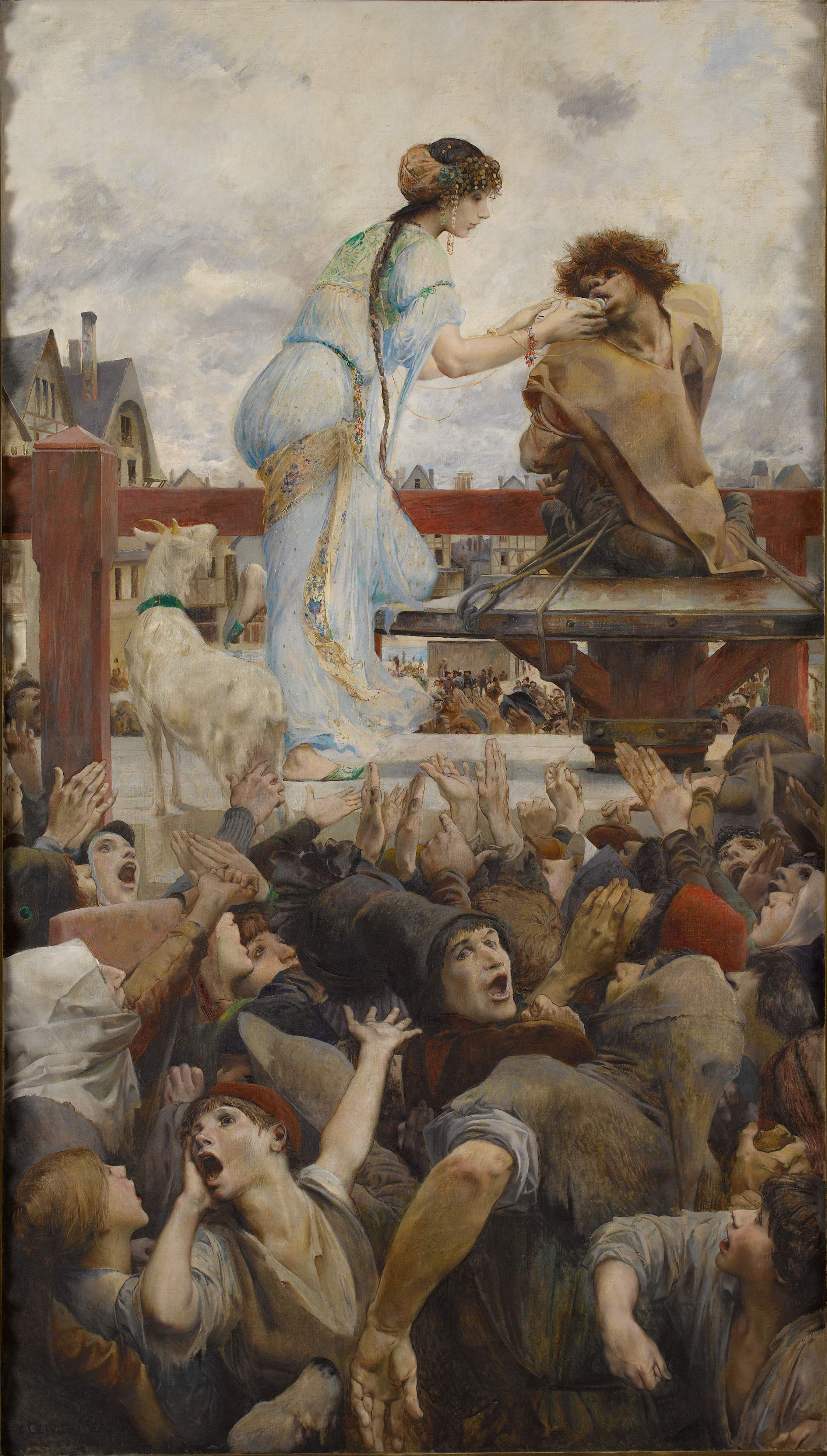 La Esmeralda donne à boire à Quasimodo sur le pilori. Huile sur toile de Luc-Olivier Merson, 1903.